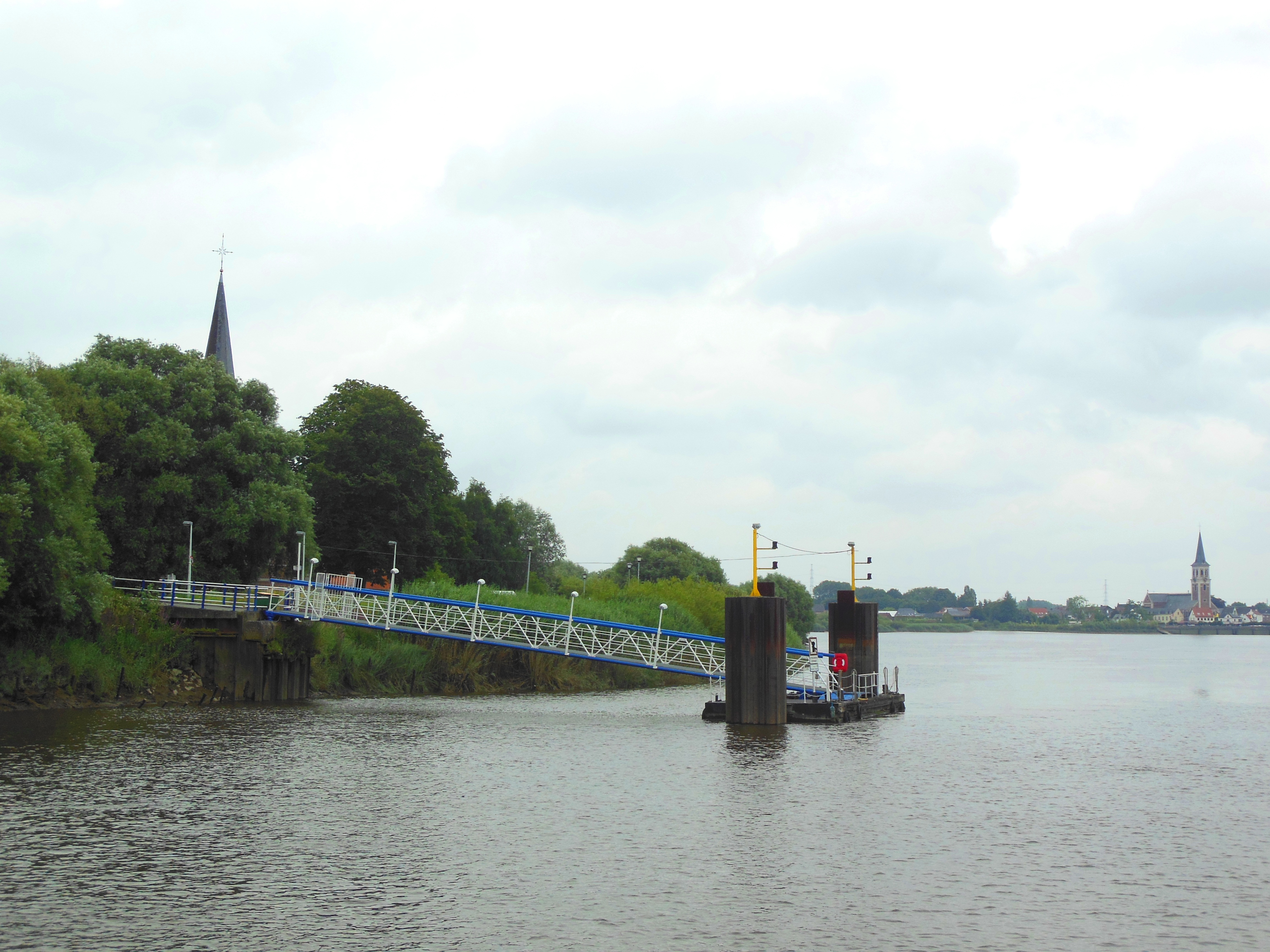 foto genomen vanop de Schelde, van de dorpen Mariekerke (vooraan) en Sint - Amands (achteraan, in Klein - Brabant